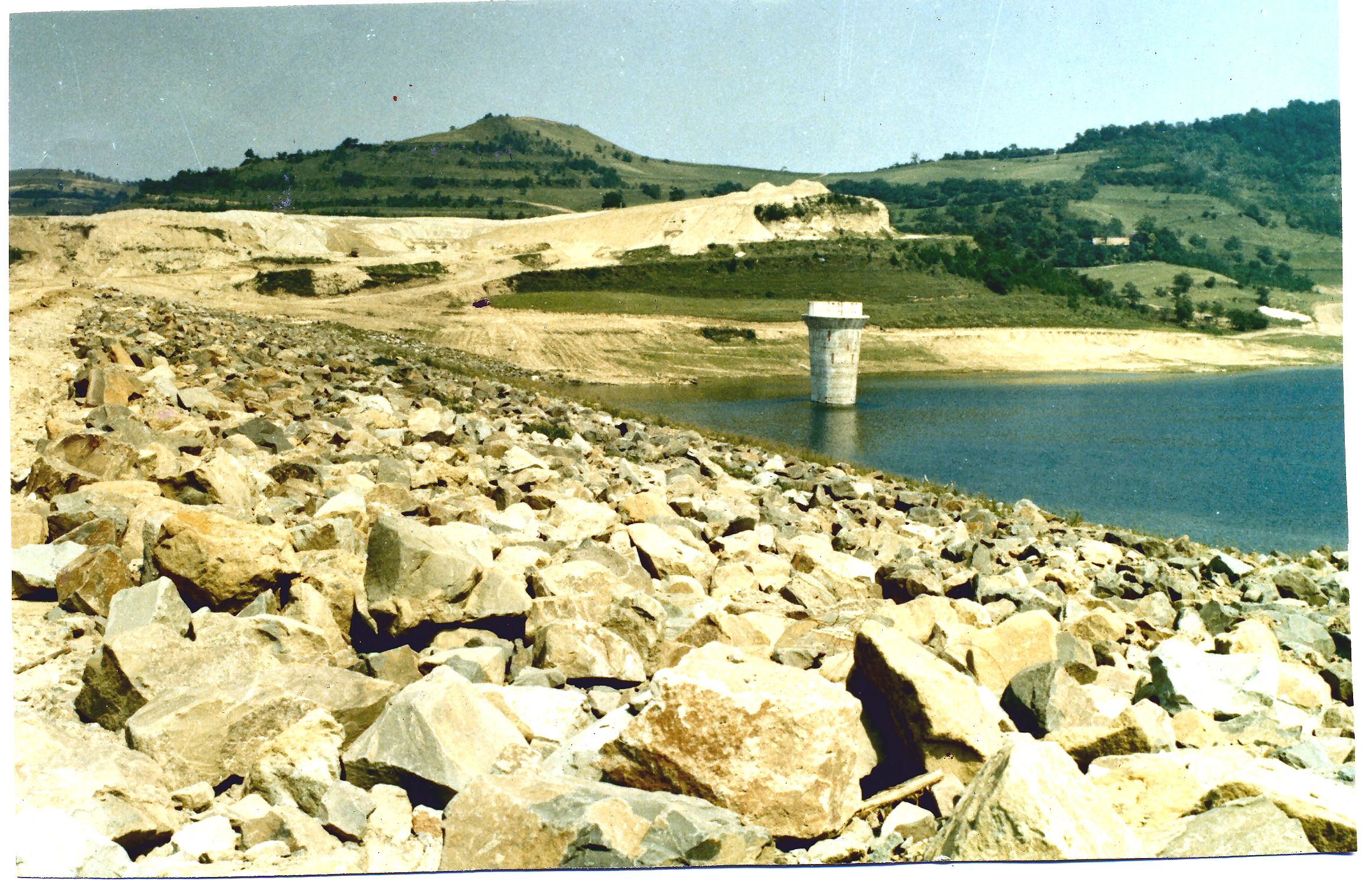 Ighiş dam in Romania